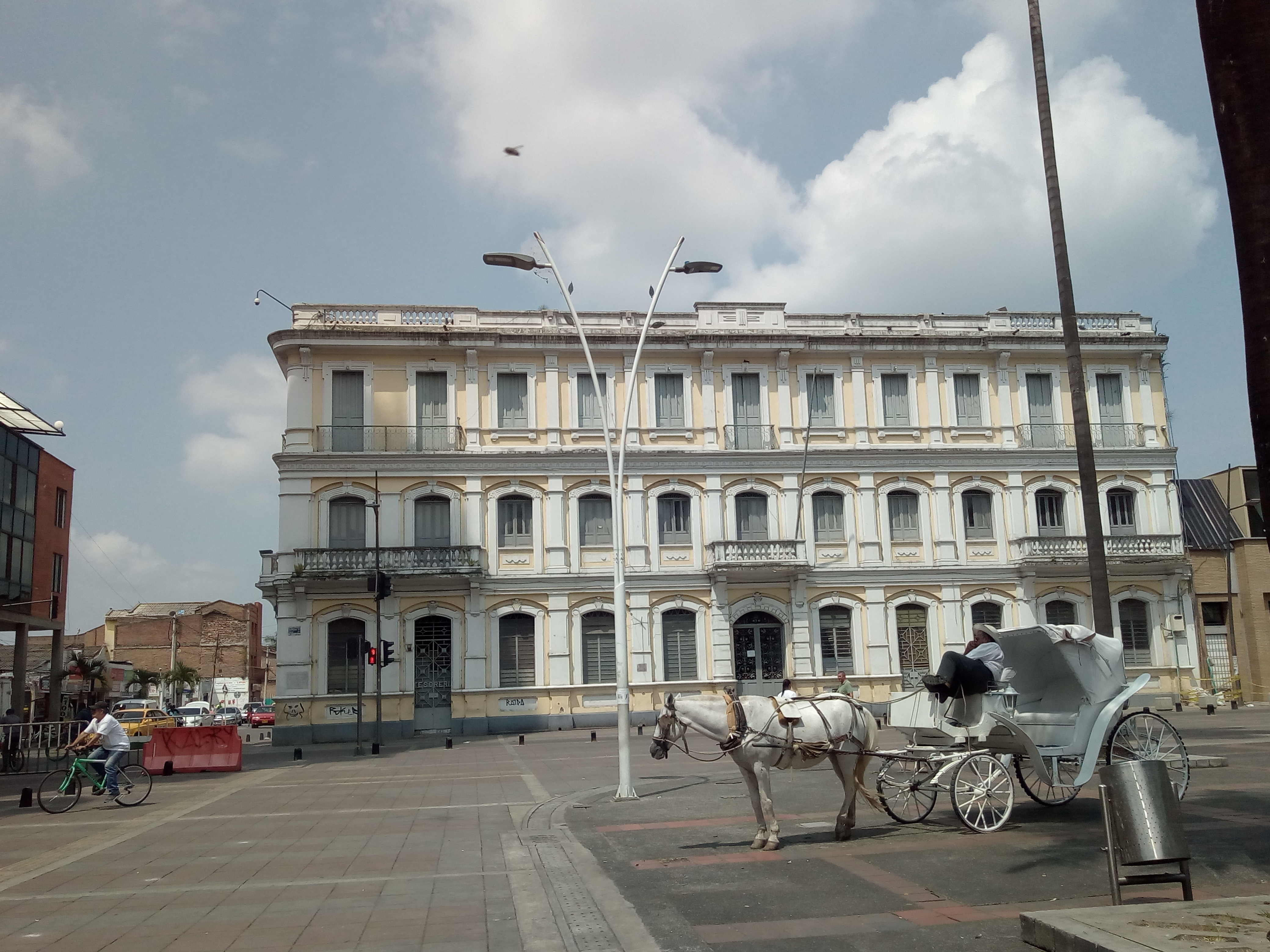 Tomada desde Parque Bolivar